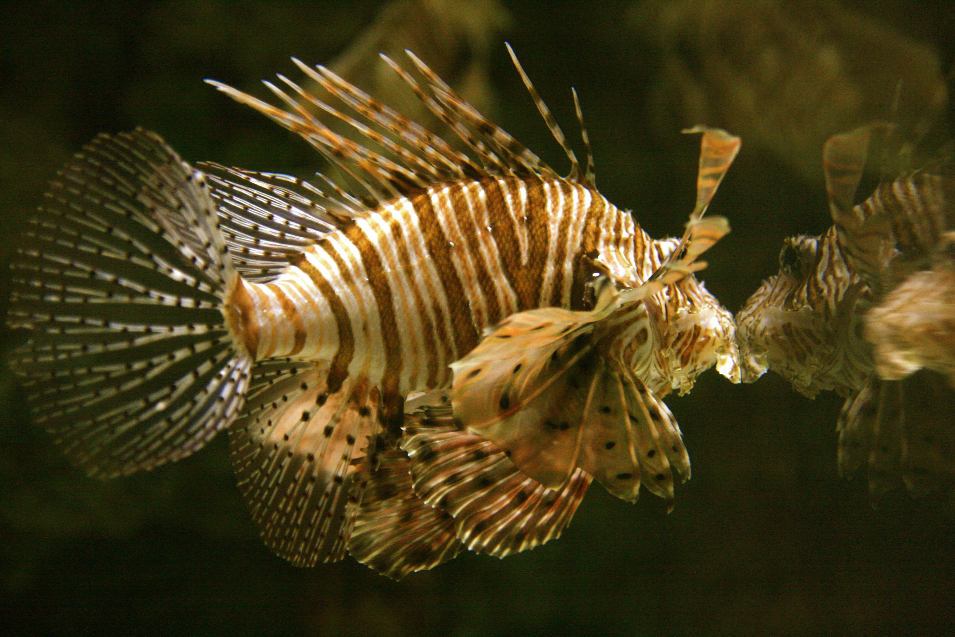 Un poisson au Shark Reef, attration du Mandalay Bay. Cette photo est tirée du site : . L'adresse exacte de cette image est : L'auteur de cette photo est : JenniferWoodardMaderazo.